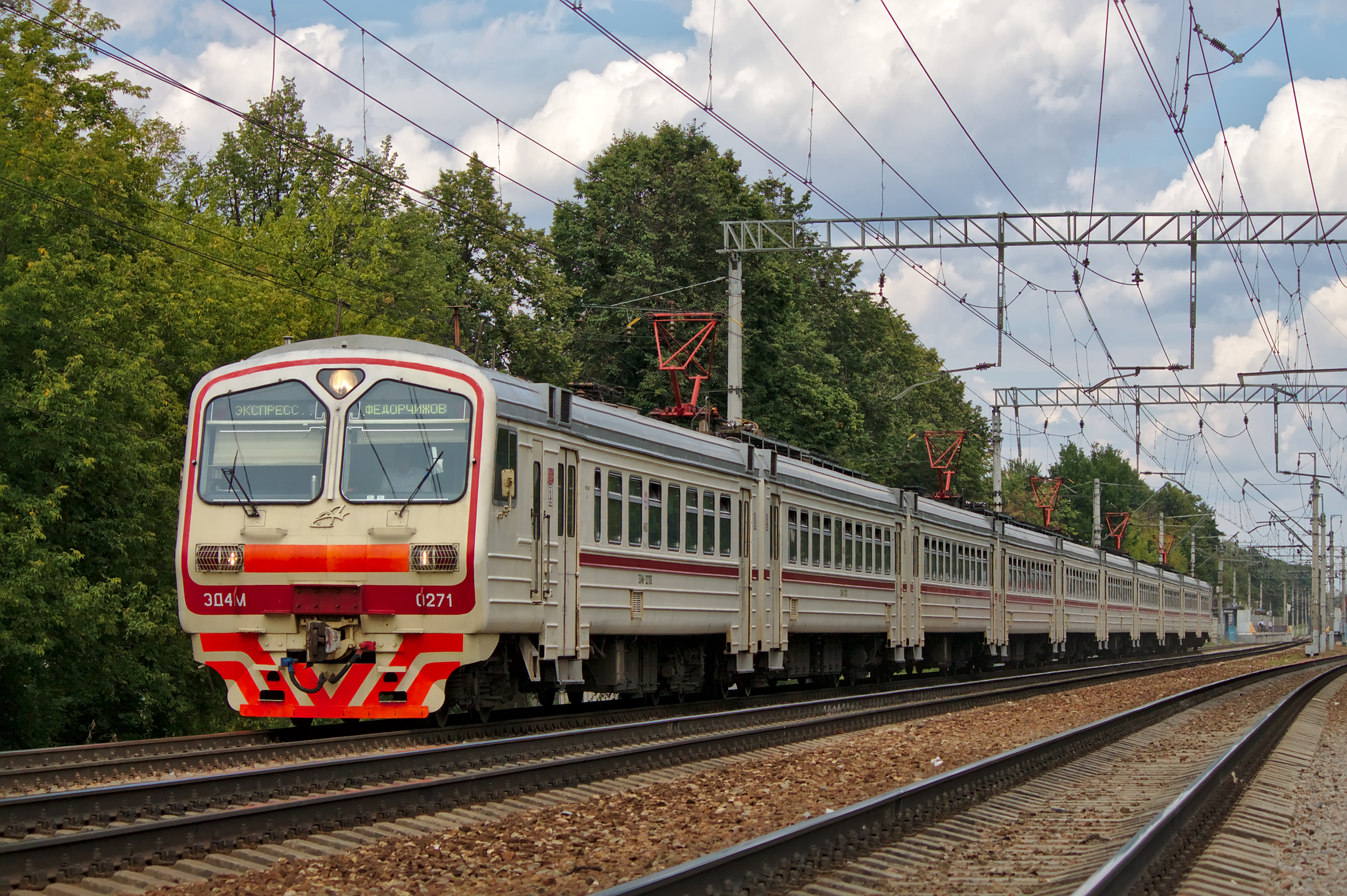 ЭД4М-0271, Мытищи см. фото 607934 в альбоме автора